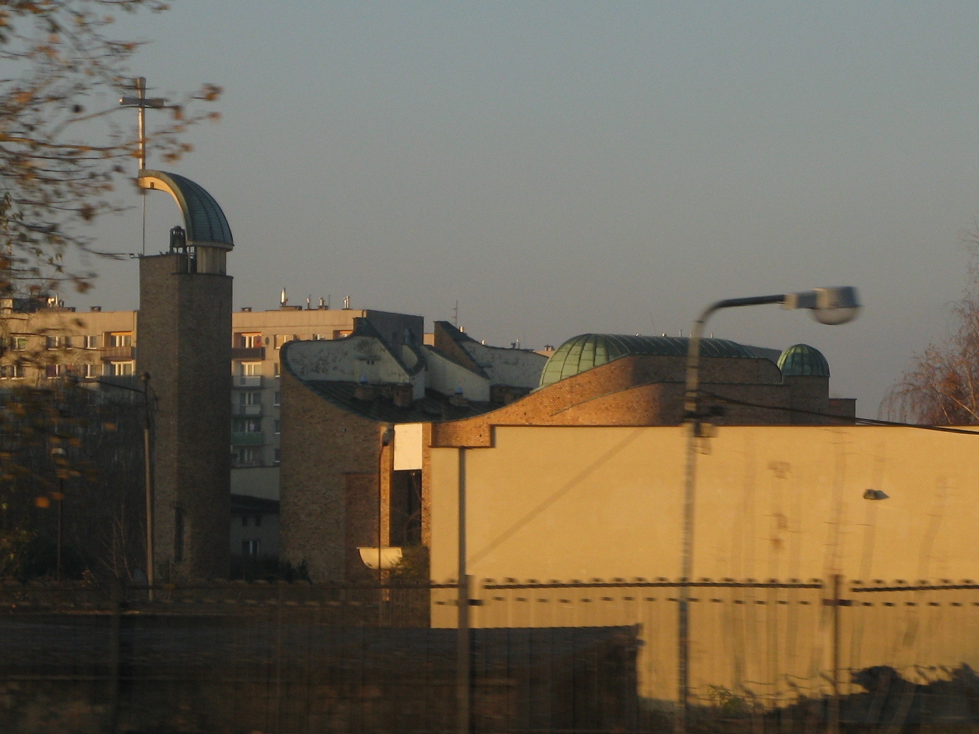 Matki Bożej Różańcowej w Katowicach-Zadolu (dzielnica Ligota-Panewniki), ul. Zadole 36.